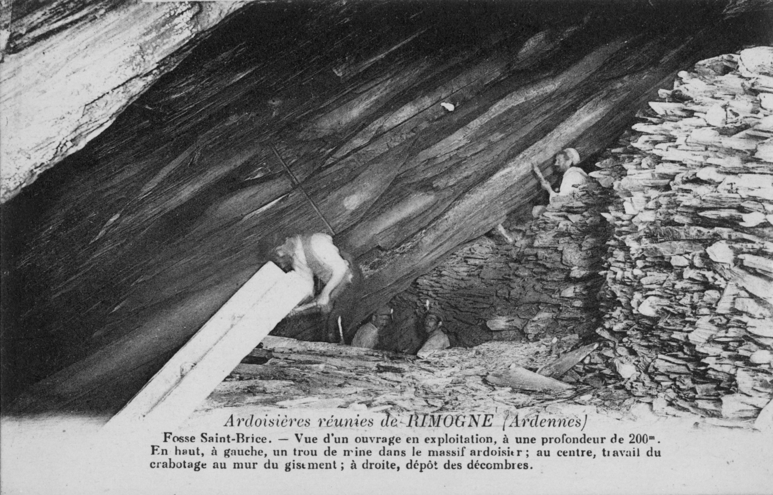 Carte postale des ardoisières de Rimogne